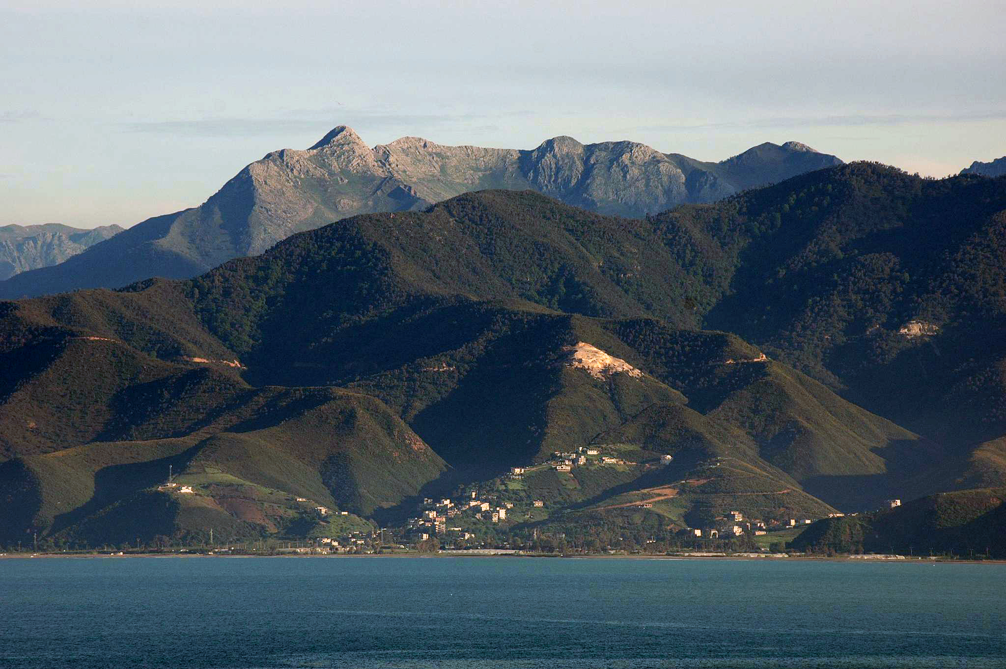 Montagnes de Kabylie depuis la baie de Béjaïa (Algérie).